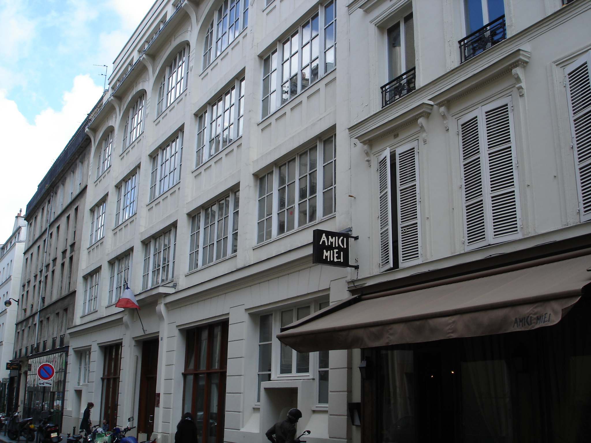 Building of the ENSCI (École nationale supérieure de création industrielle), design institute, located rue Saint-Sabin in Paris.